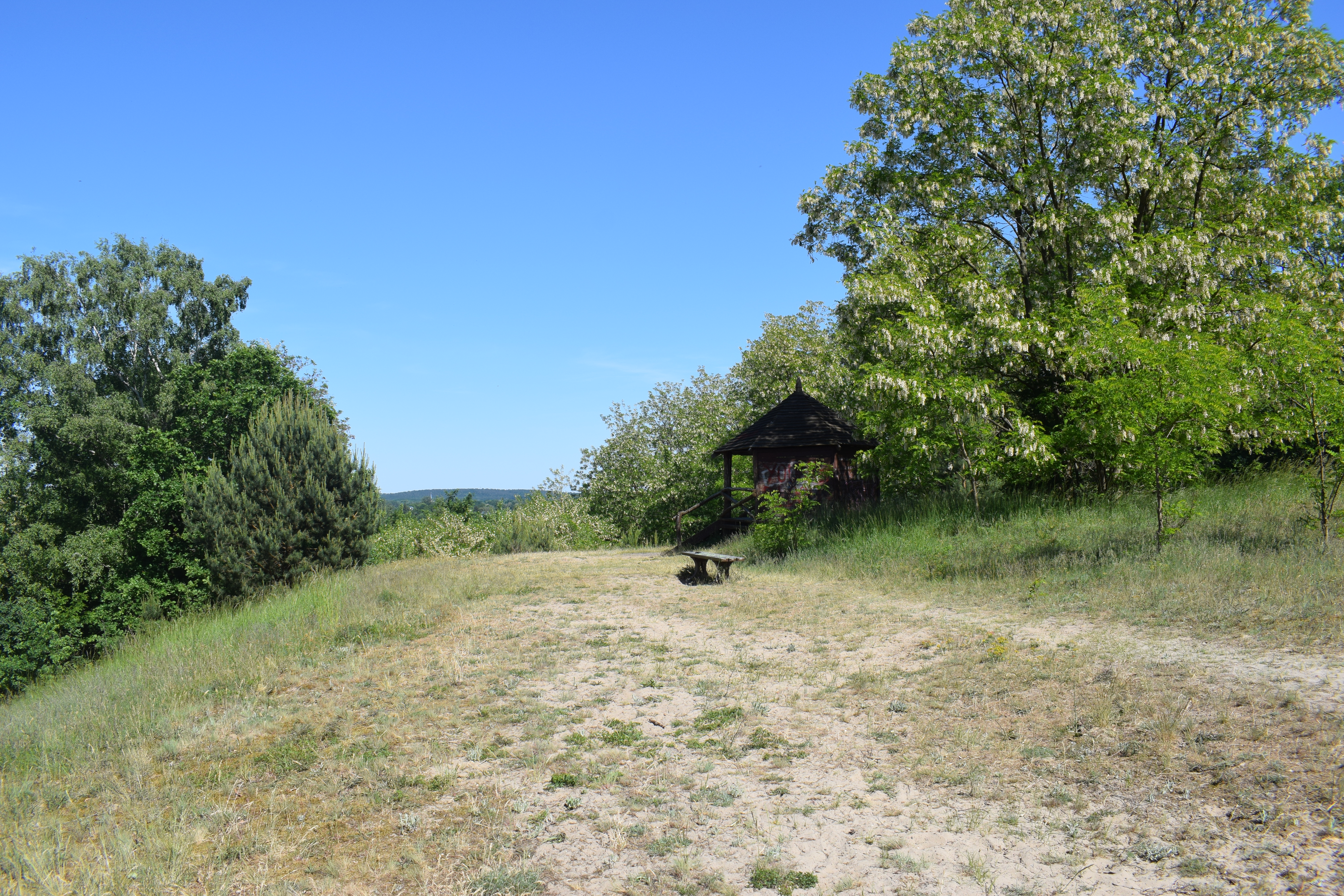 Das Belvedere im Naturschutzgebiet Glindower Alpen bei Werder (Havel).